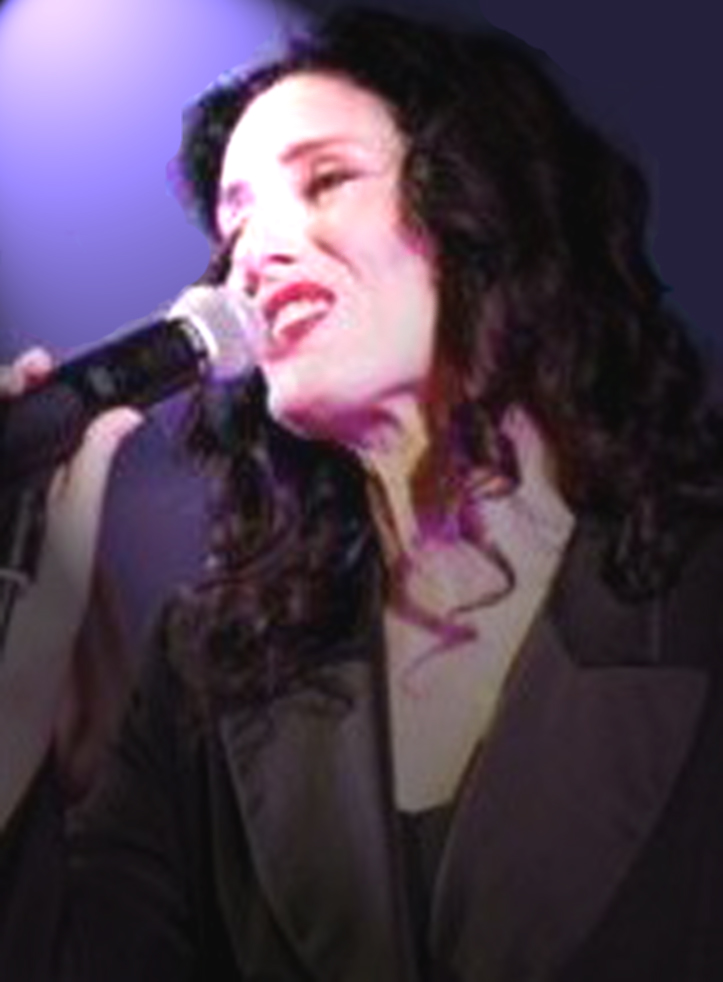 Doris Dragović na svom koncertu